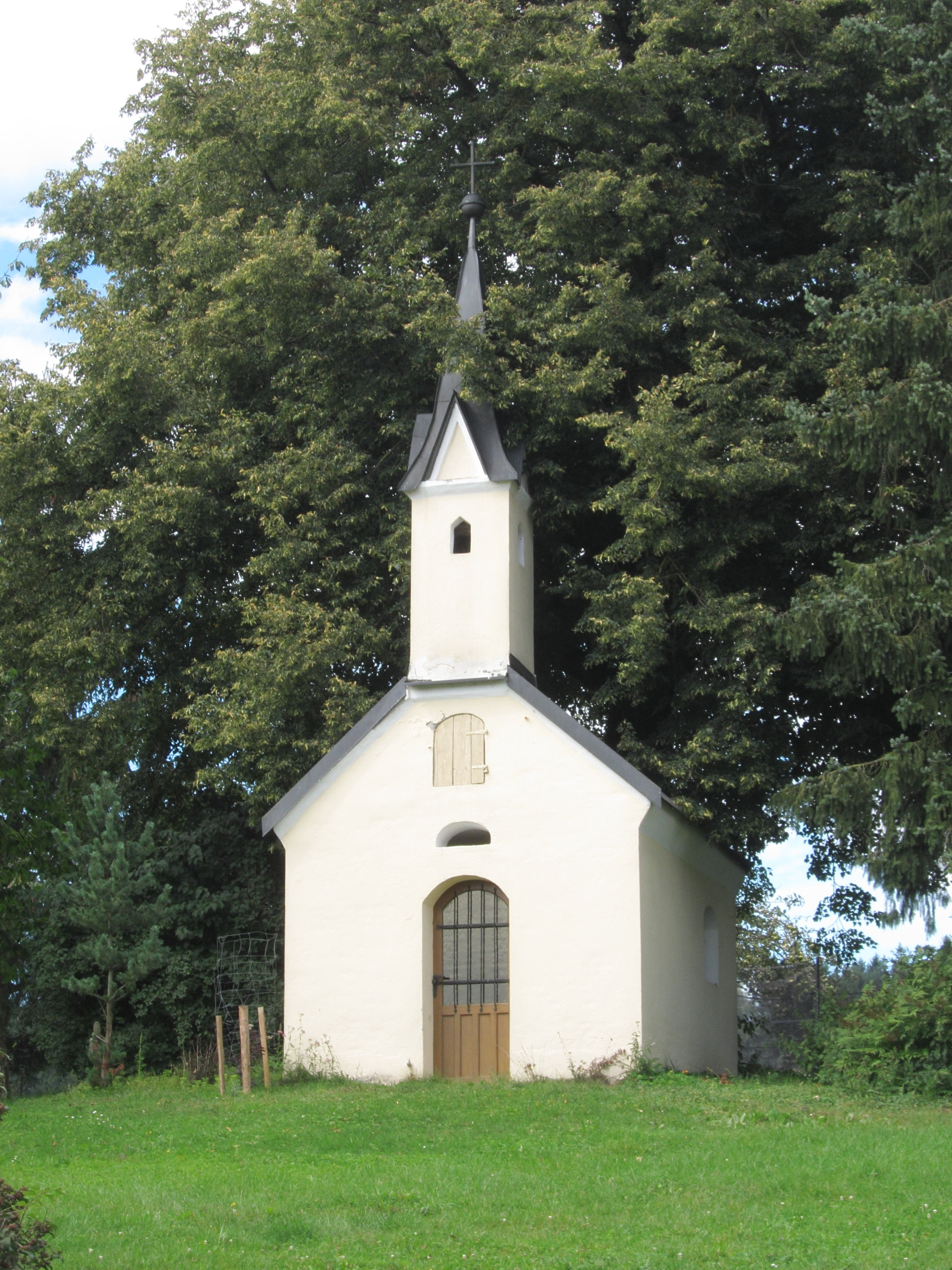 Hinterbaumberg; Hofkapelle St. Florian, Massivbau mit Dachreiter, erbaut 1721, verändert um 1875; mit Ausstattung.